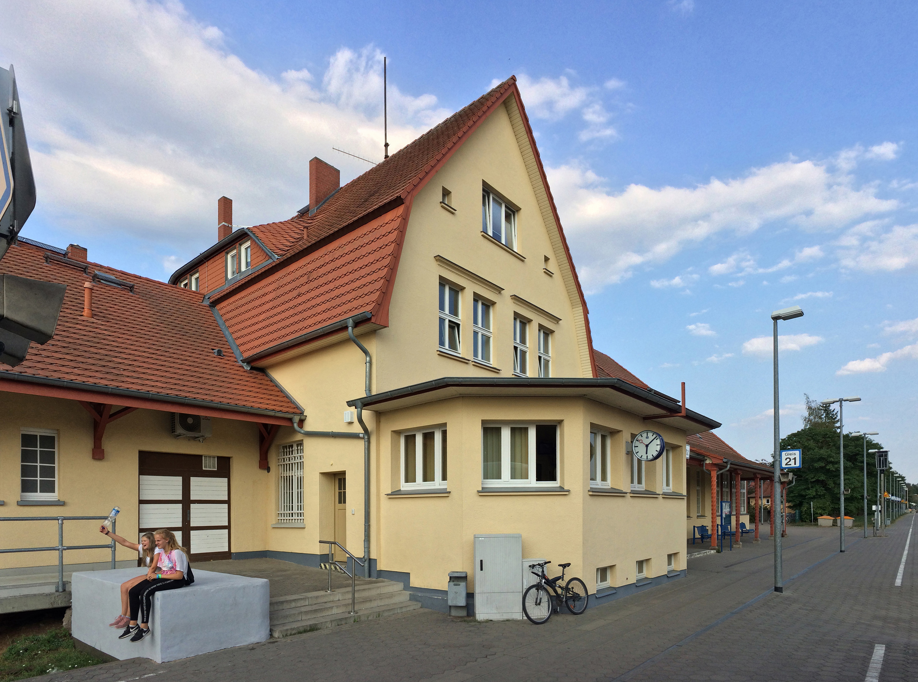 Bahnhof Zinnowitz, Usedom, Mecklenburg-Vorpommern, 1911